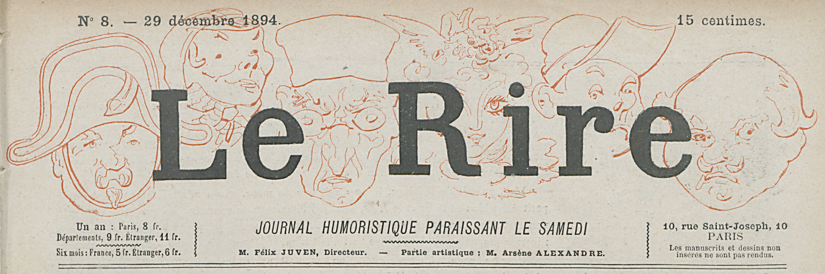 Le Rire, title of the front page.